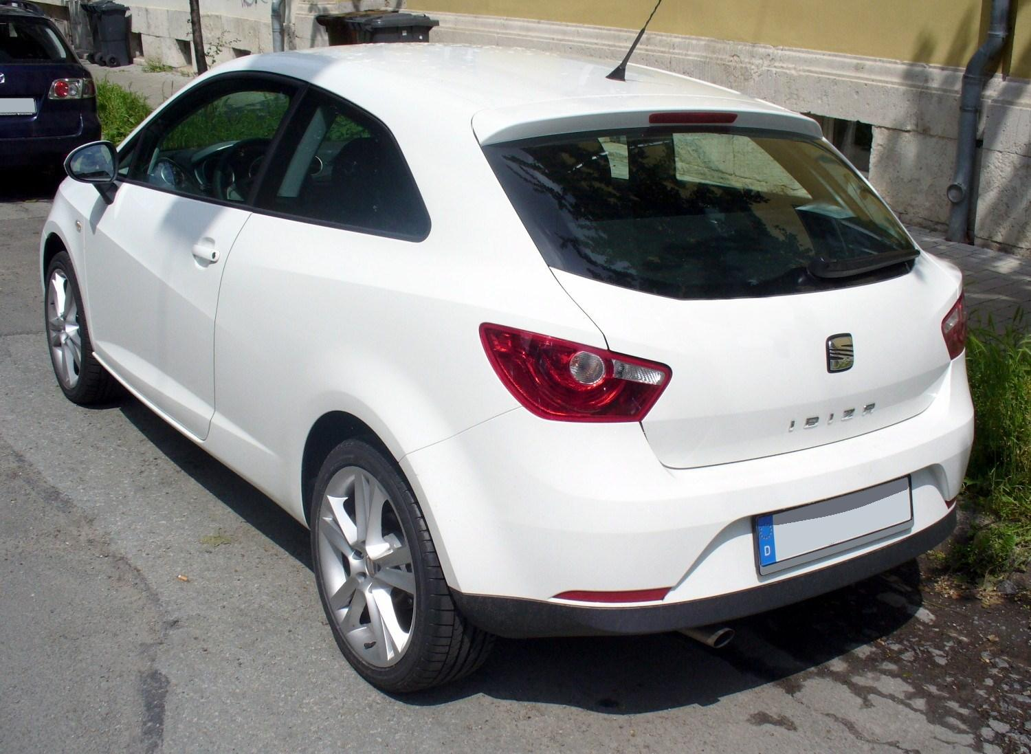 Seat Ibiza